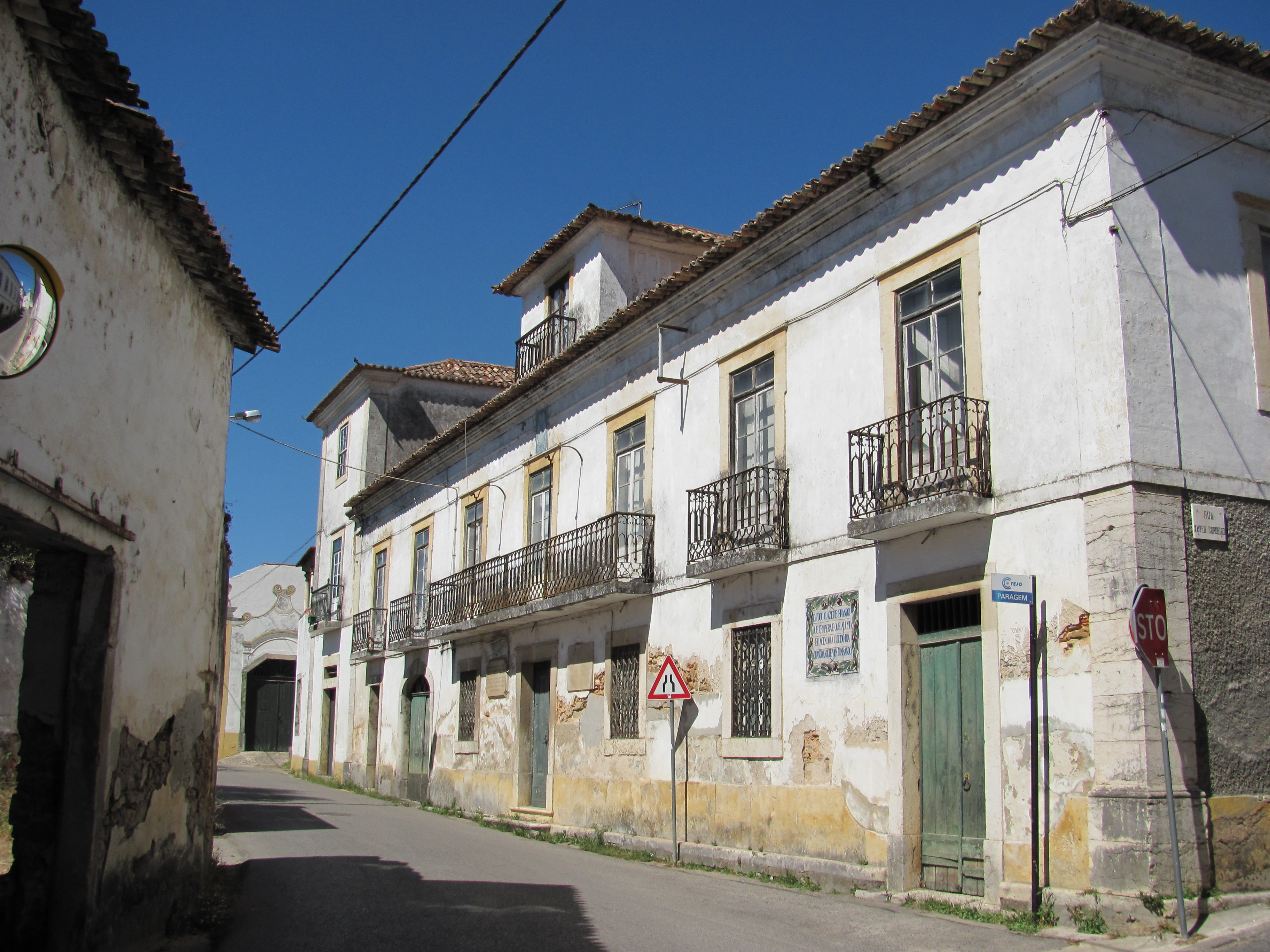 Demeure bourgeoise typique du XIXe siècle portugais, résidence de l'écrivain António Xavier Rodrigues Cordeiro.